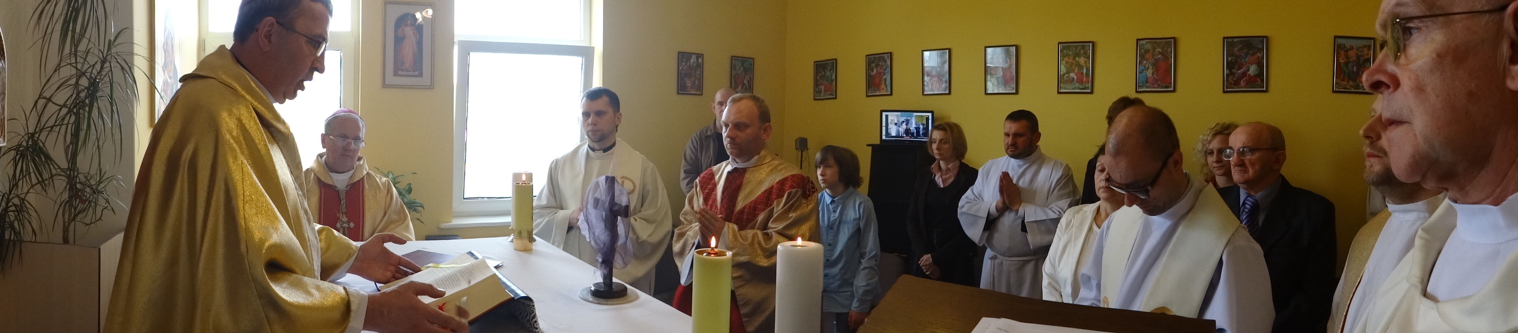 Kaplica NS w Miliczu